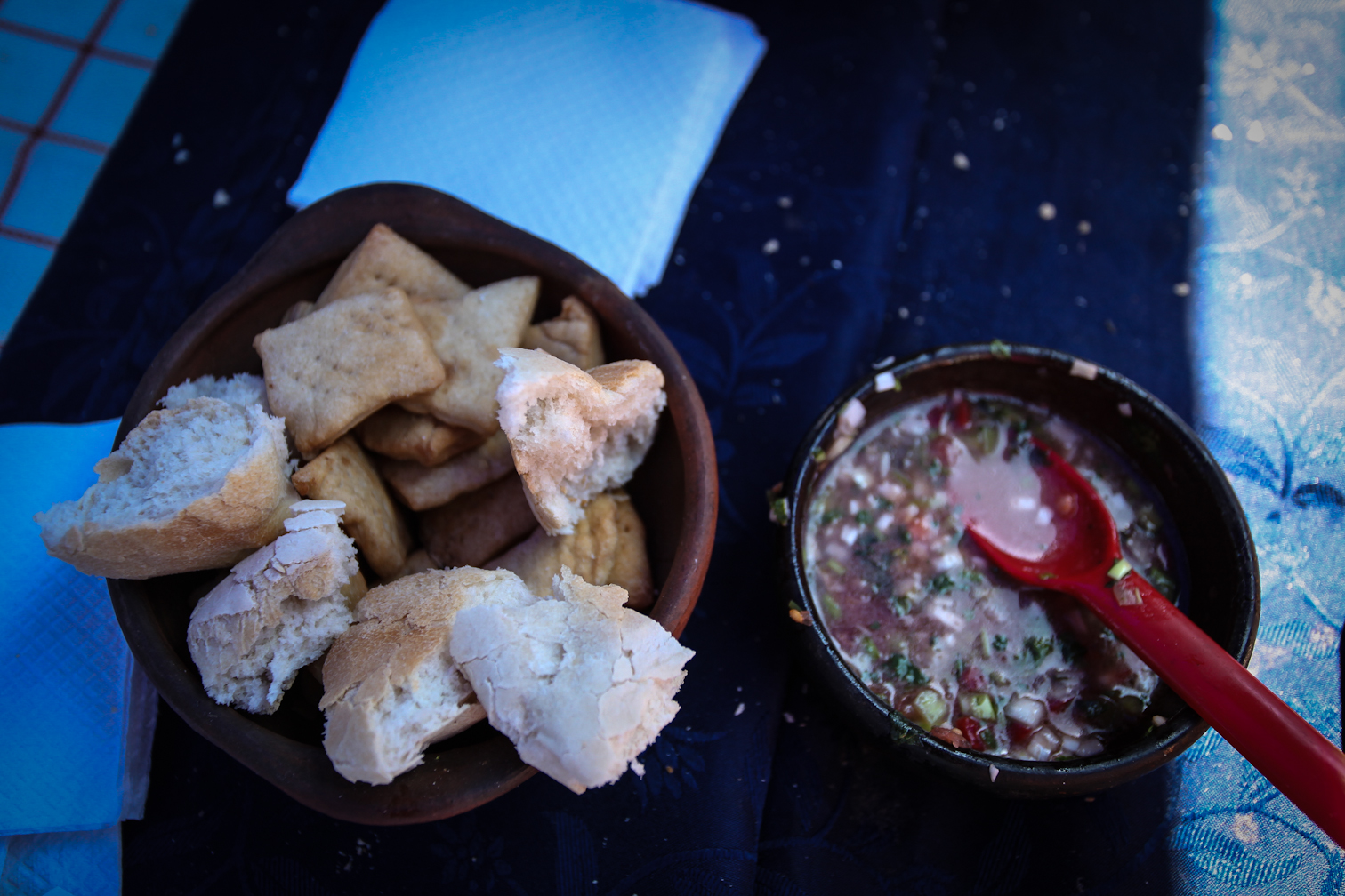 IV Campeonato Mundial del Pebre Guachacas - Vega Central